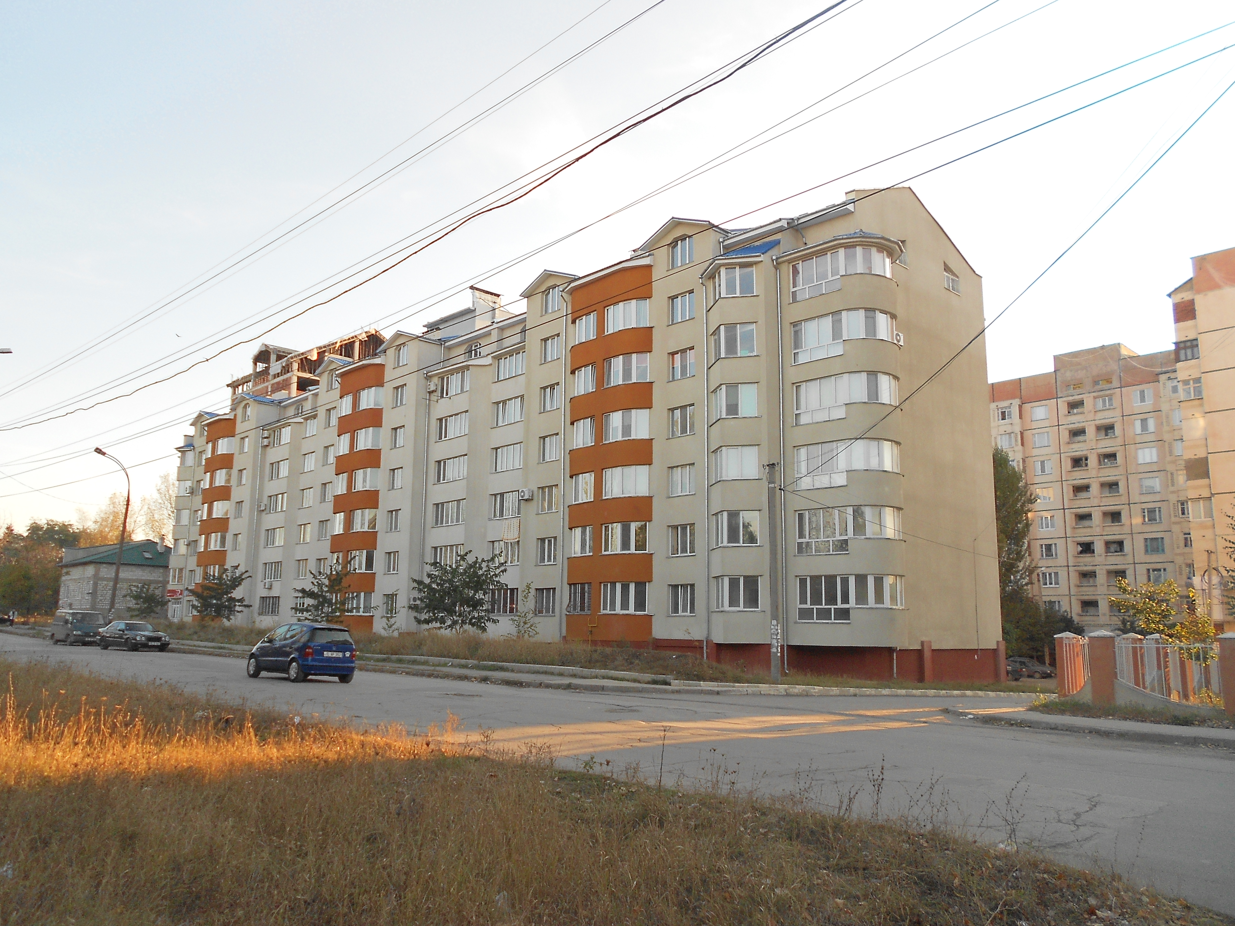 Bloc locativ în cartierul Dacia, Bălți